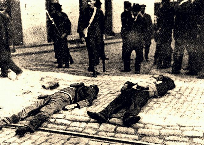 En el transcurso de la huelga portuaria de 1903, los manifestantes intentaron tomar por asalto el edificio de El Mercurio de Valparaíso, producto de ello, desde las oficinas del diario se dispara hacia la calle. Siete personas mueren. Debido a estos hechos surgirá una nueva publicación periódica en Valparaíso: El Matasiete, un «modestísimo periódico de agitación obrera», señala Raúl Silva Castro. Su título da cuenta del mote con el cual algunos comienzan a referirse a El Mercurio de Valparaíso, luego de su participación en la huelga de 1903. El periódico es fundado por Juan Luis Jerez. Sus páginas se reproducen en la imprenta El Deber, ubicada en calle Las Heras. Según Joaquín Edwards Bello, este libelo –en sus palabras– apareció al día siguiente de la jornada de violencia vivida en las calles de Valparaíso. Sin embargo, la exactitud de dicho dato nos parece, a lo menos, discutible. De hecho, Jorge Iturriaga precisa que la publicación se inicia a fines de mayo. Luego de los muertos en el asalto a El Mercurio de Valparaíso, el diario morigeró su postura hacia los huelguistas. Así, dos días después, el 14 de mayo de 1903, el periódico señala que la huelga era un «derecho sagrado» y que las compañías fueron tercas al resistirse al arbitraje. Meses después, El Matasiete, en su edición del 18 de agosto de ese año, se refería a ese cambio en la postura del diario mediante los siguientes versos: Diario canalla y rastrero que de usura haces alarde ya no insultes al obrero como ayer, torpe y cobarde. Te humillas, le haces la pata, cubriéndote de baldón y le ofreces generoso «en crónica una sección». Tarde, muy tarde has venido de rimbor ruin, a cambiar y al pueblo, diario mezquino pretendes engatusar...